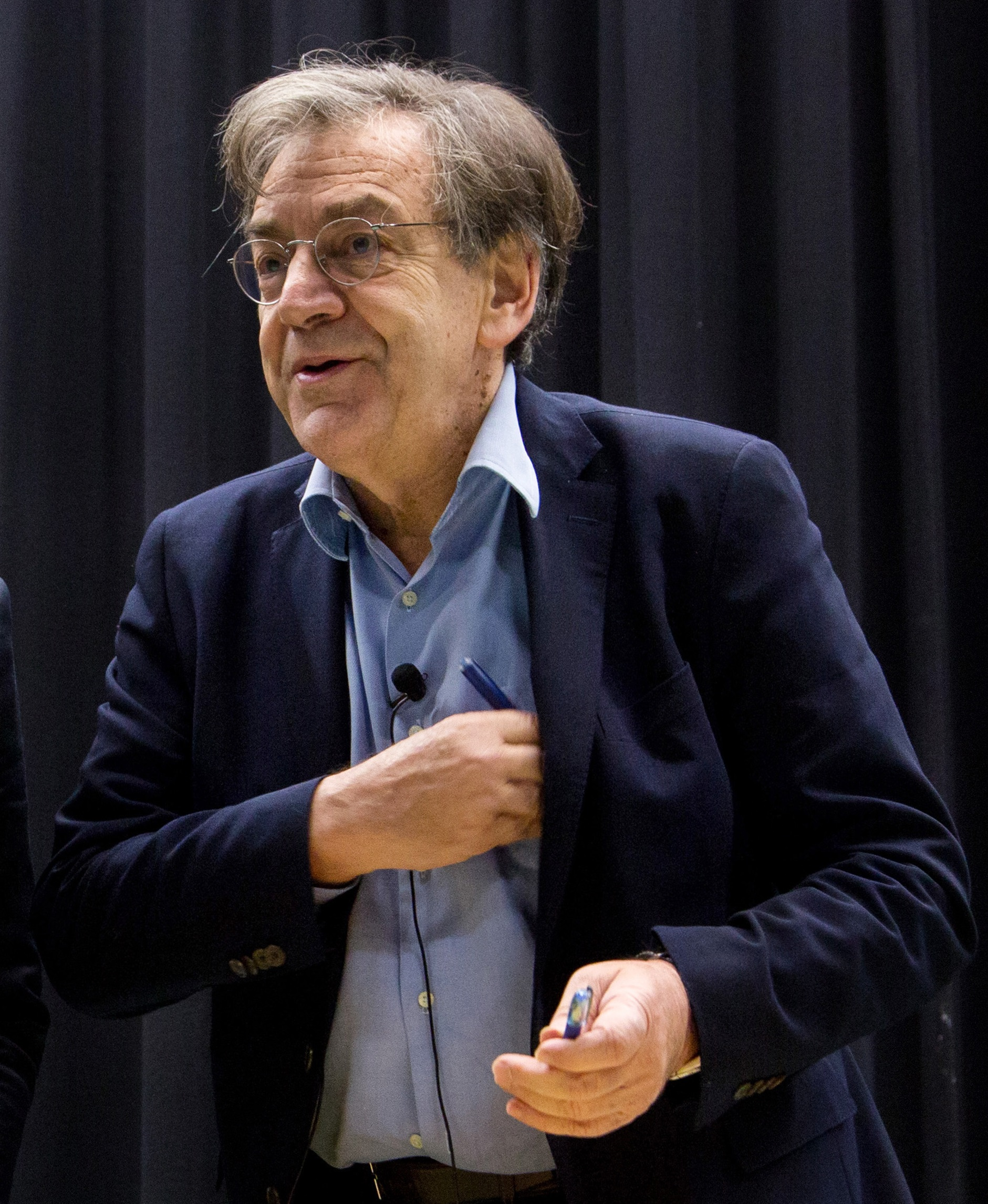 Cours HSS avec Alain Finkielkraut invité par Michaël Foessel